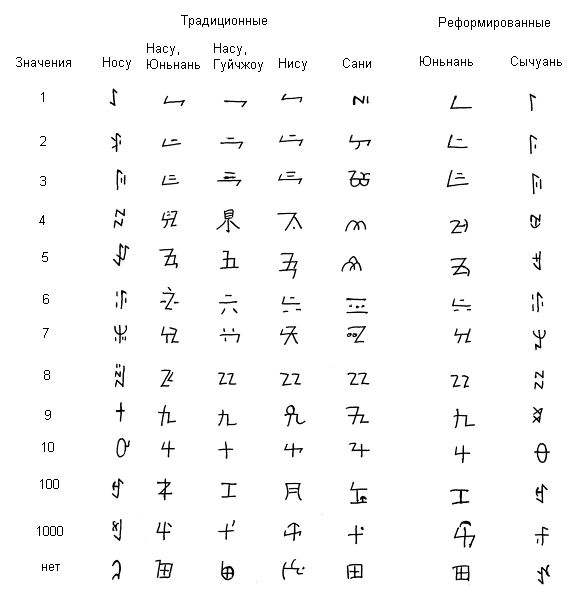 Варианты письма и